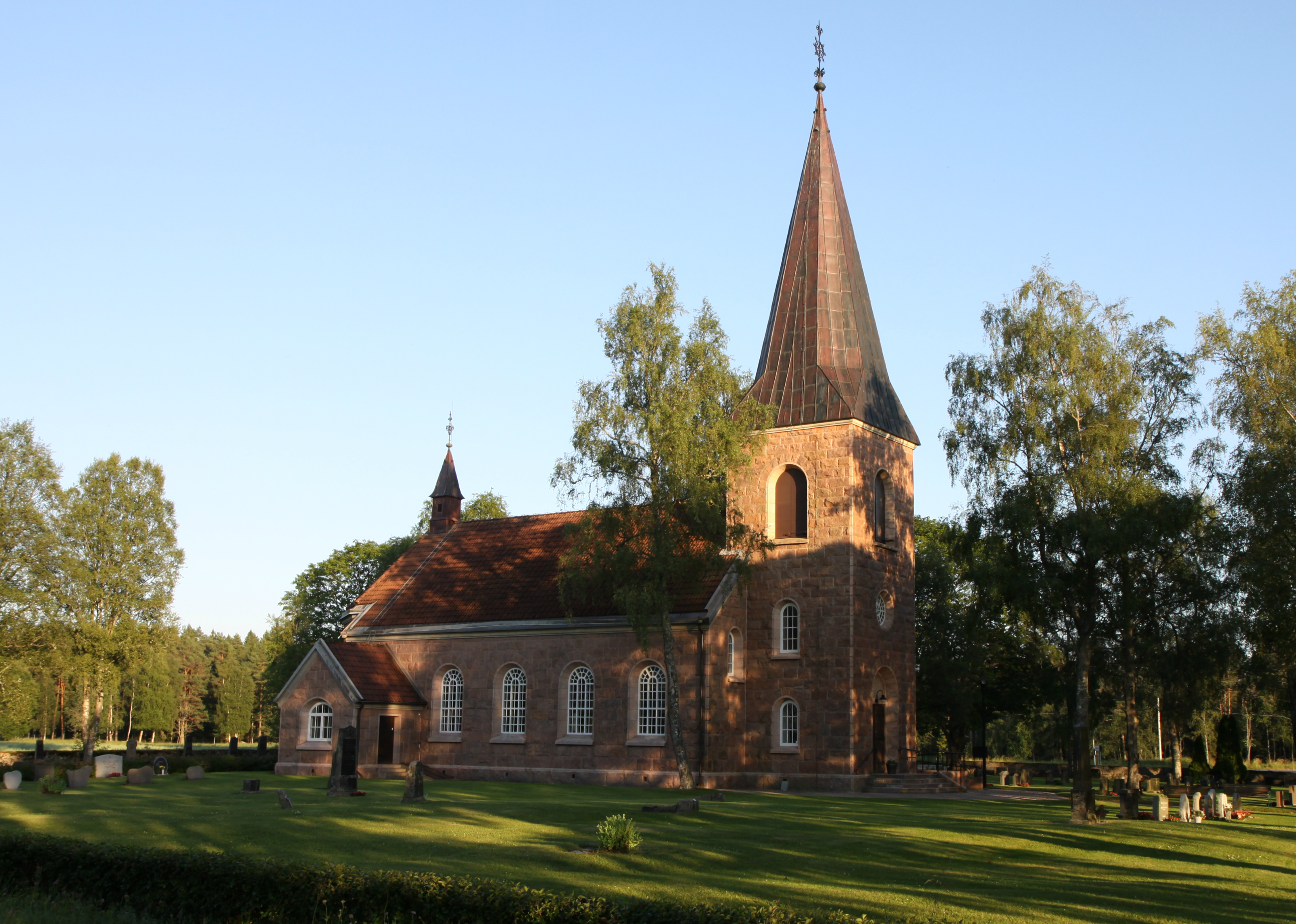 Vänga kyrka